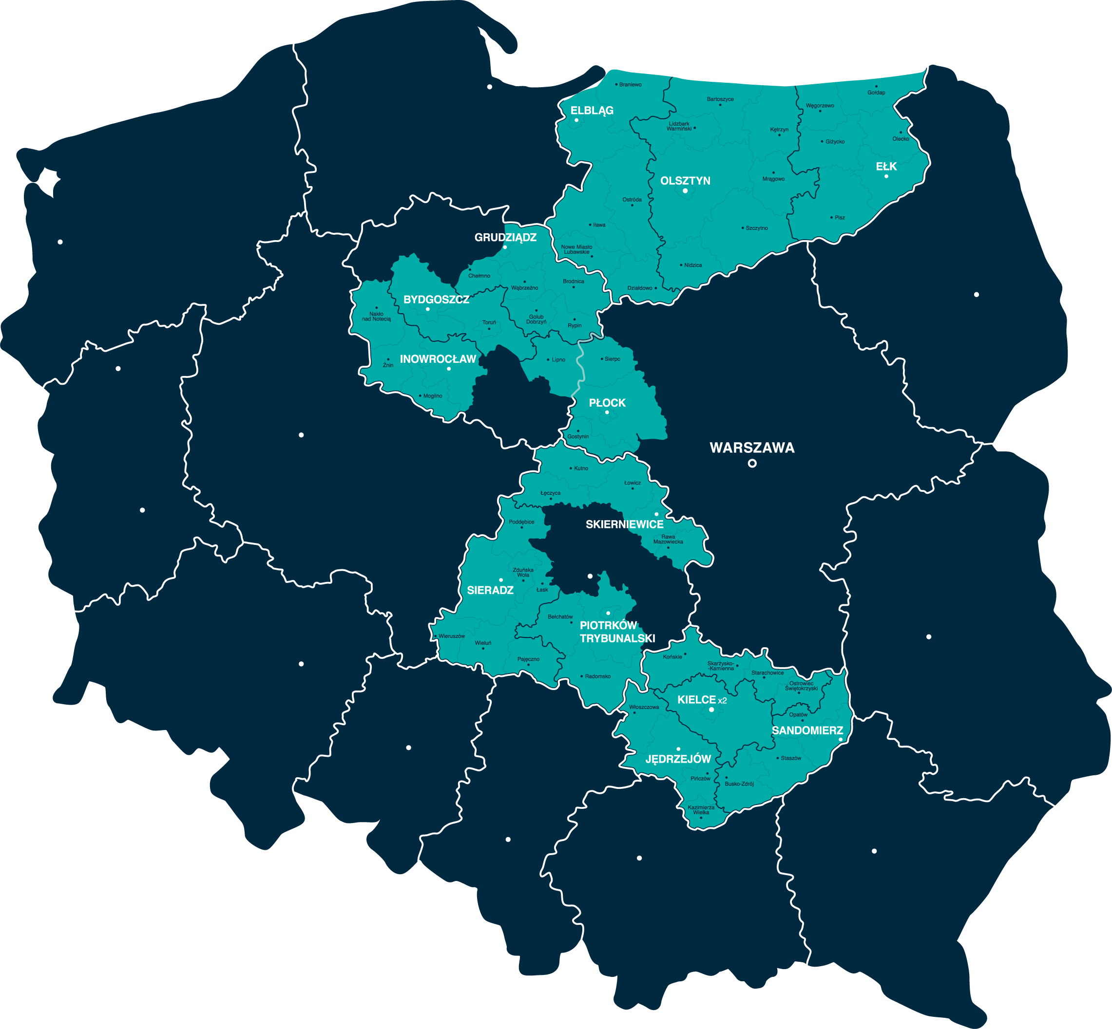 Cztery regiony, w których NEXERA buduje sieć w ramach POPC